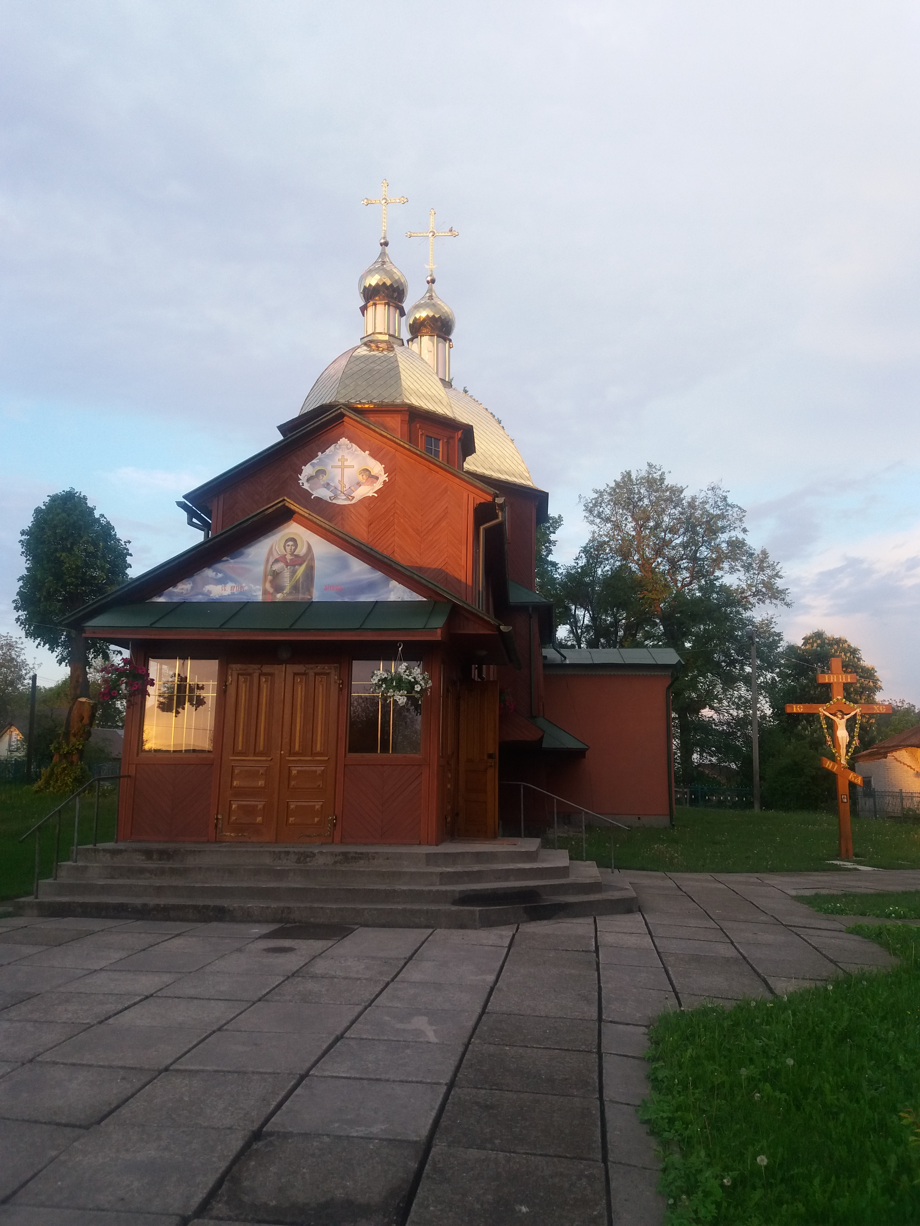 Після реставрації 2016р.